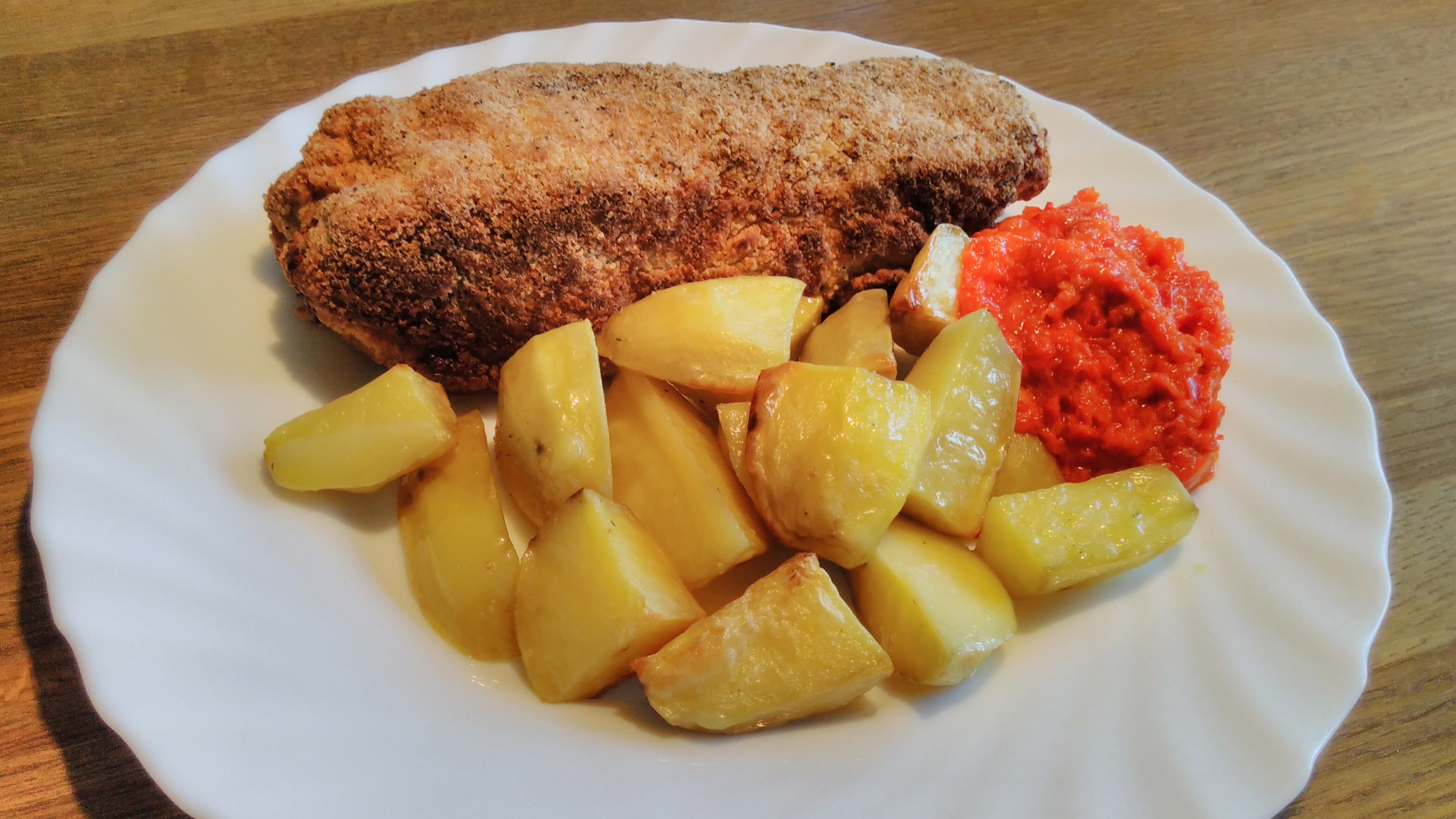 Karađorđeva med kyftpotatis och ajvar. Fläskkött och en blandning av feta- och färskost.